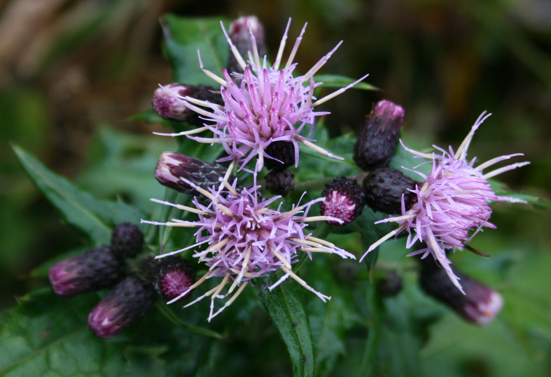 コイブキアザミ 伊吹北尾根にて